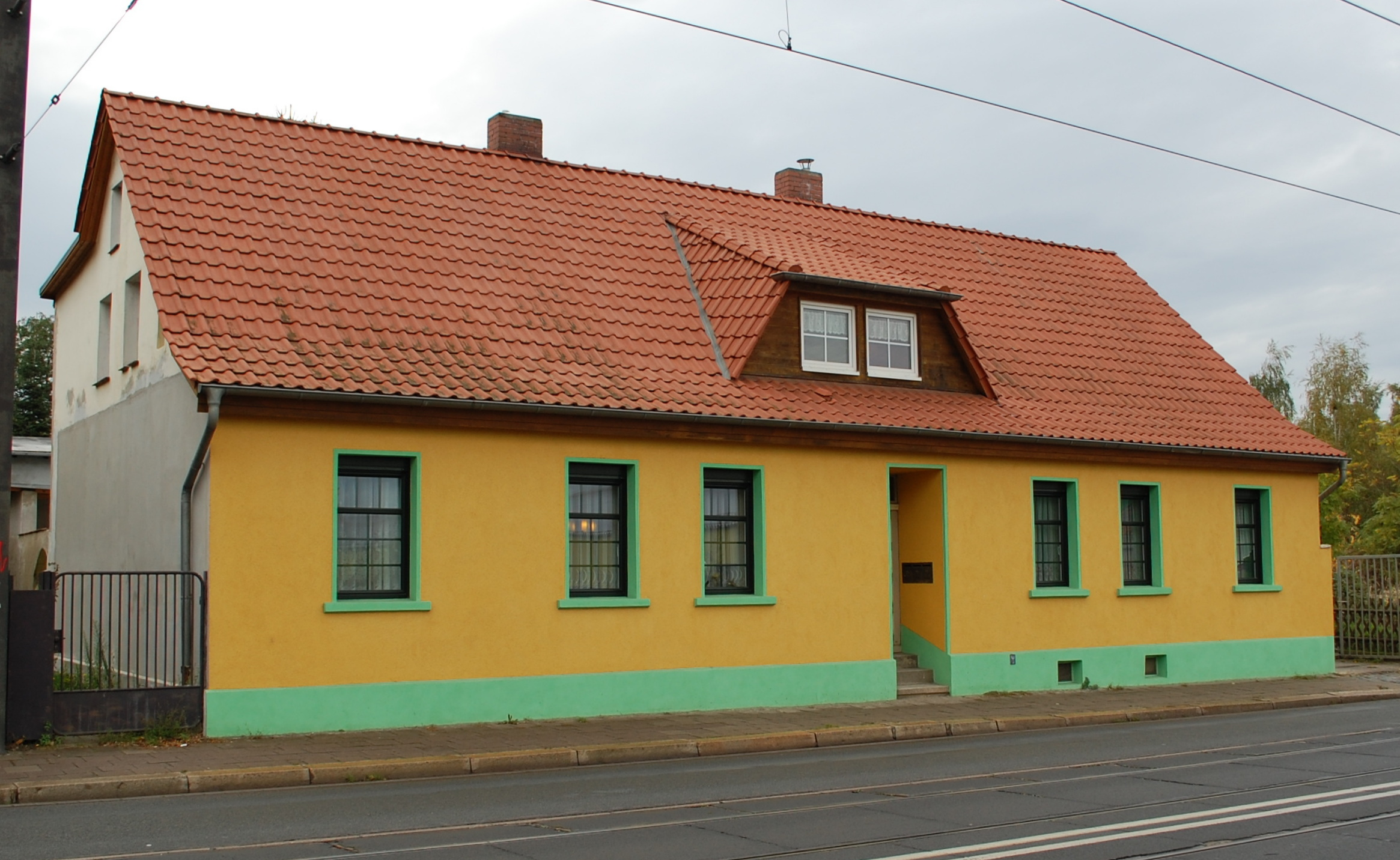 Haus Alt Westerhüsen 6 in Magdeburg